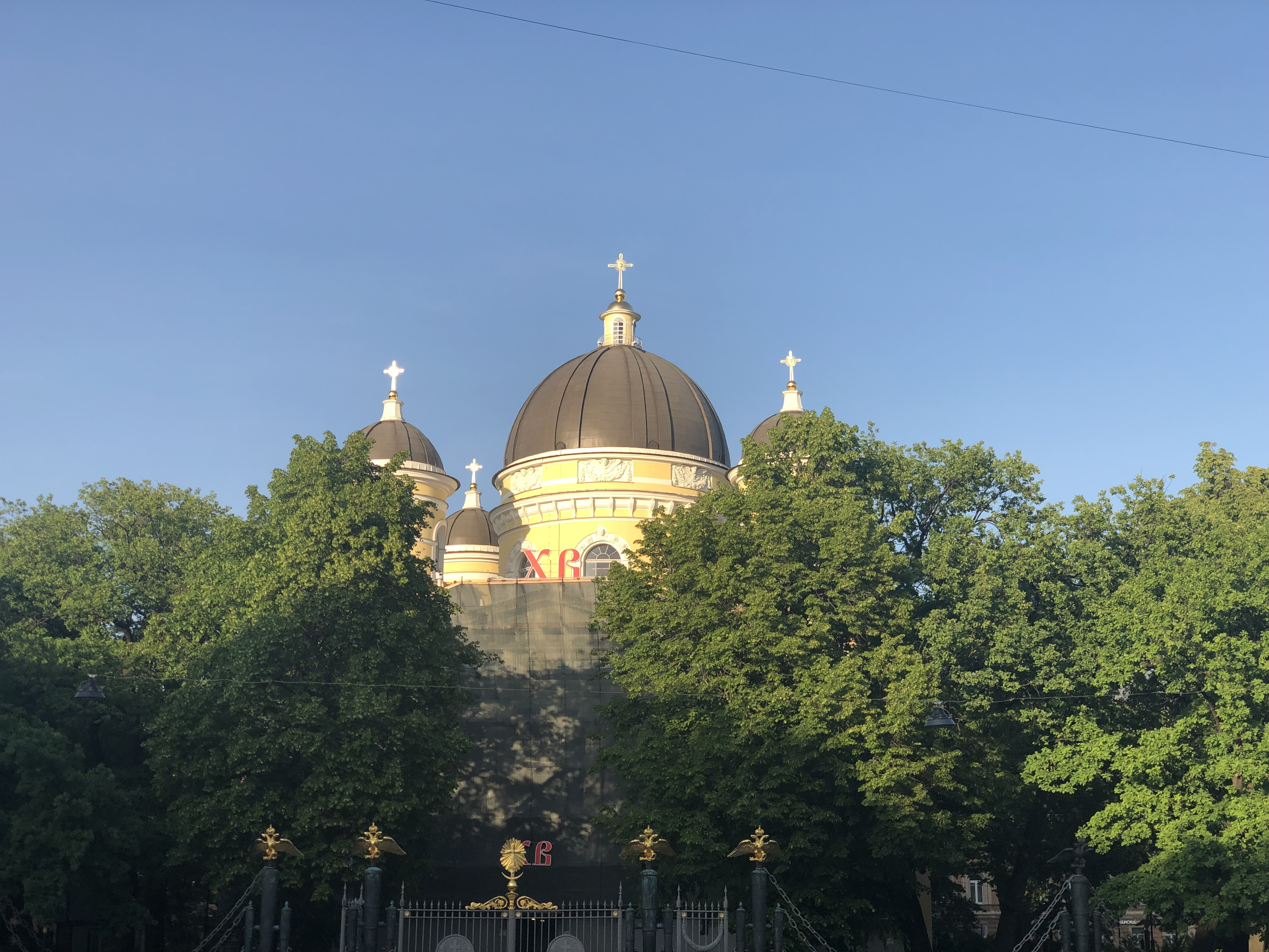 Преображенский собор